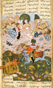 სპარსული ხელნაწერი ხელნაწერტა ეროვნულ ცენტრში